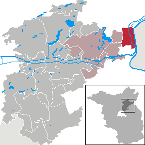 Lunow-Stolzenhagen in Brandenburg (Country) - District Barnim